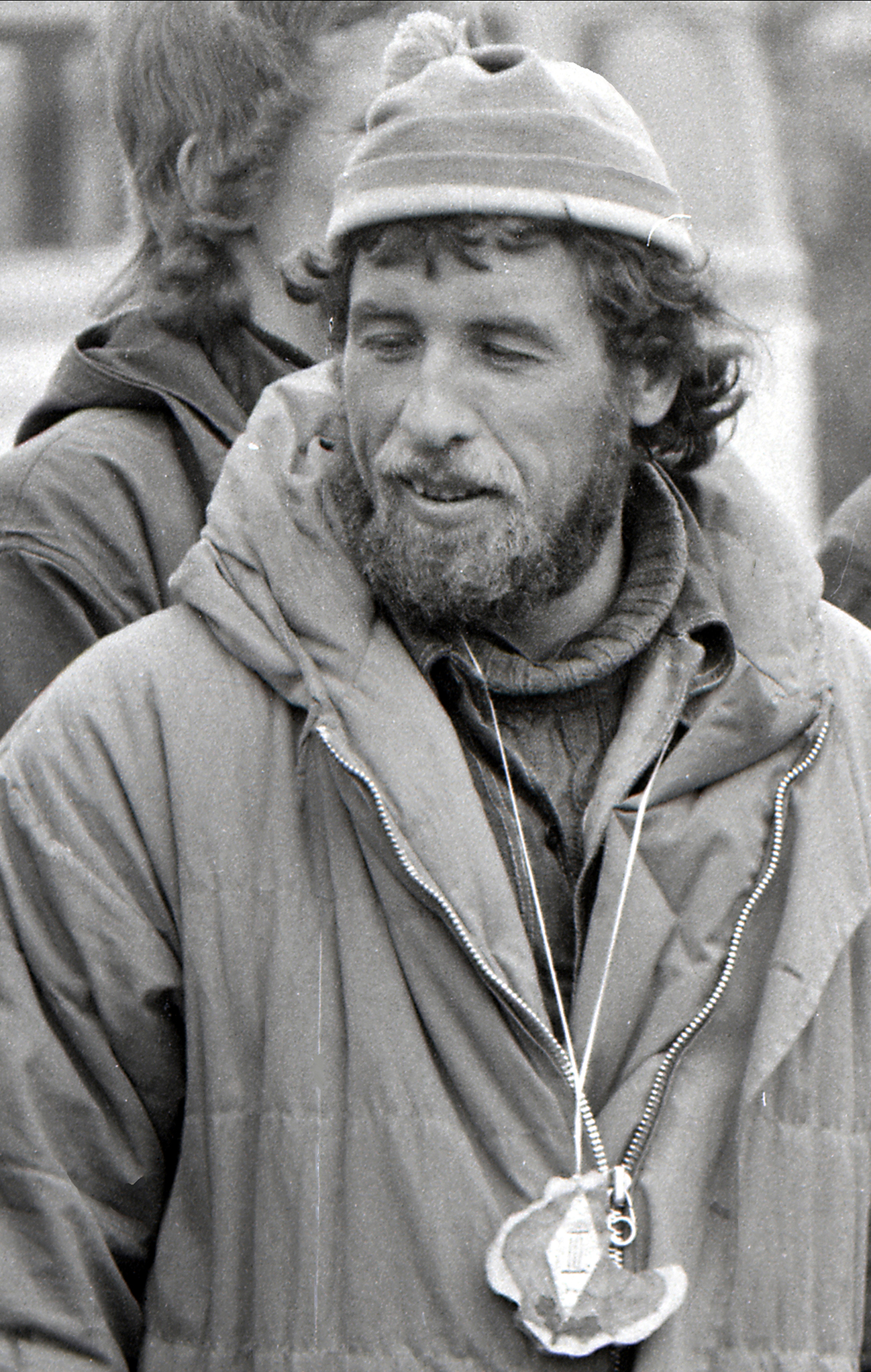 Tõnu Tennisson.